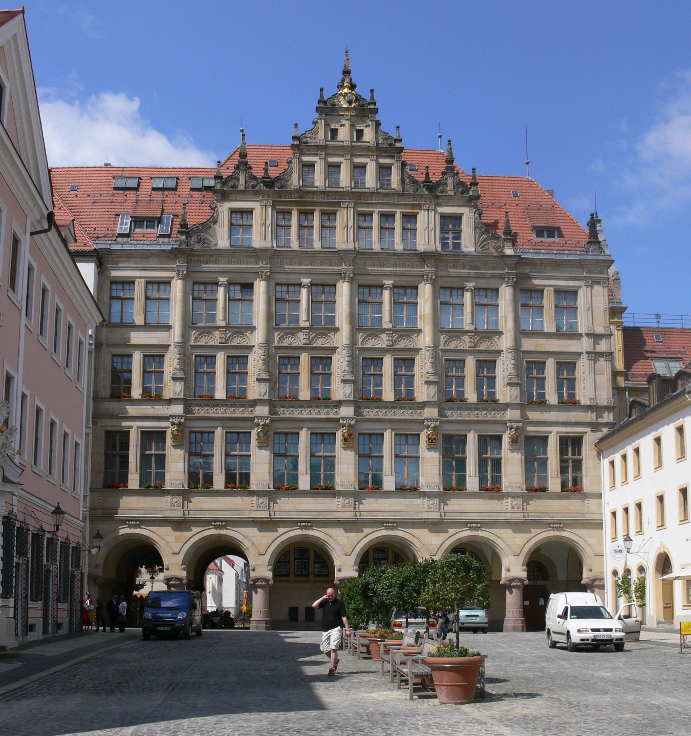 Neues Rathaus (Neo-Renaissance-Flügel des Görlitzer Rathauses am Untermarkt), Görlitz